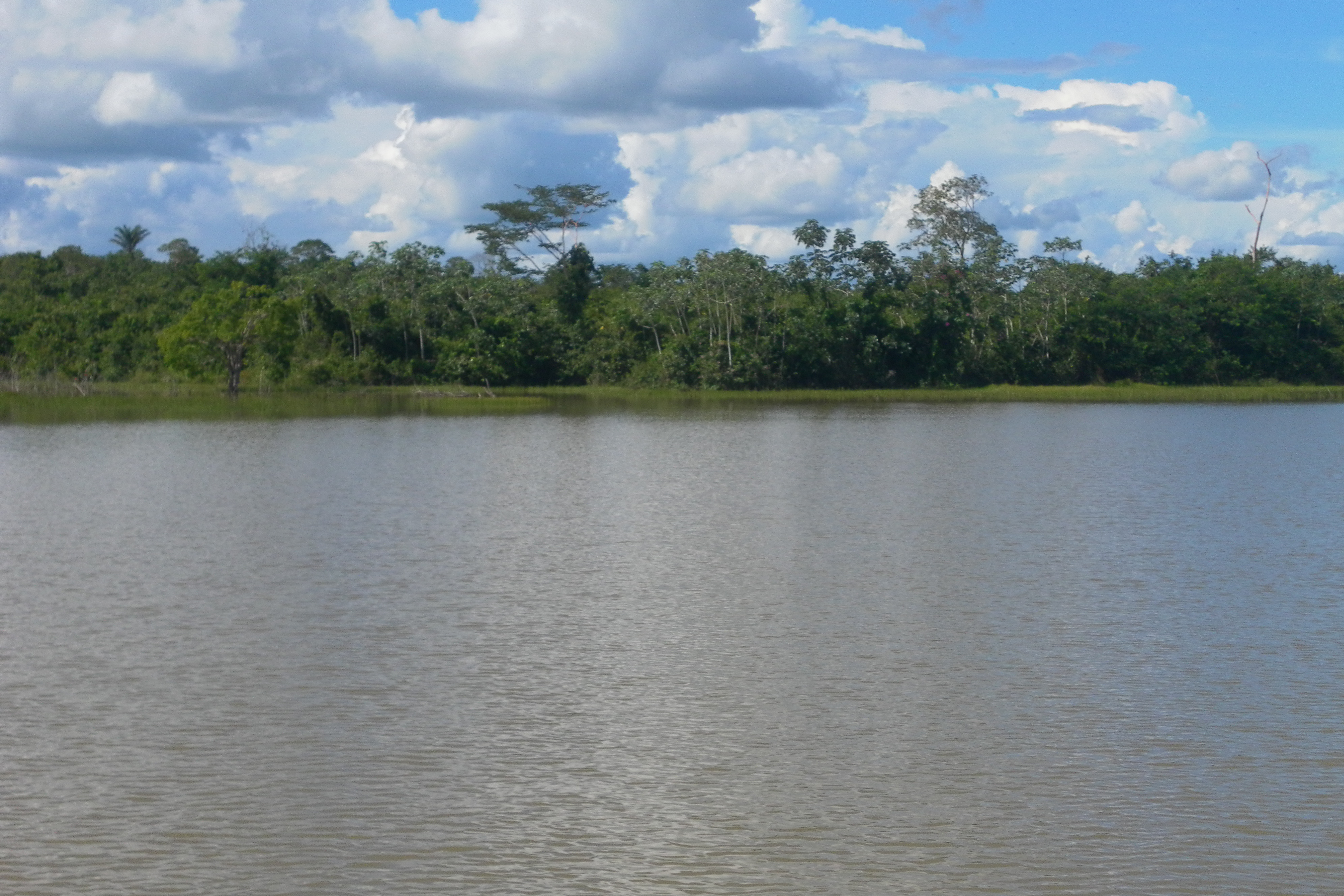 Rio na Floresta Amazonica, no município de Espigão do Oeste, RO.